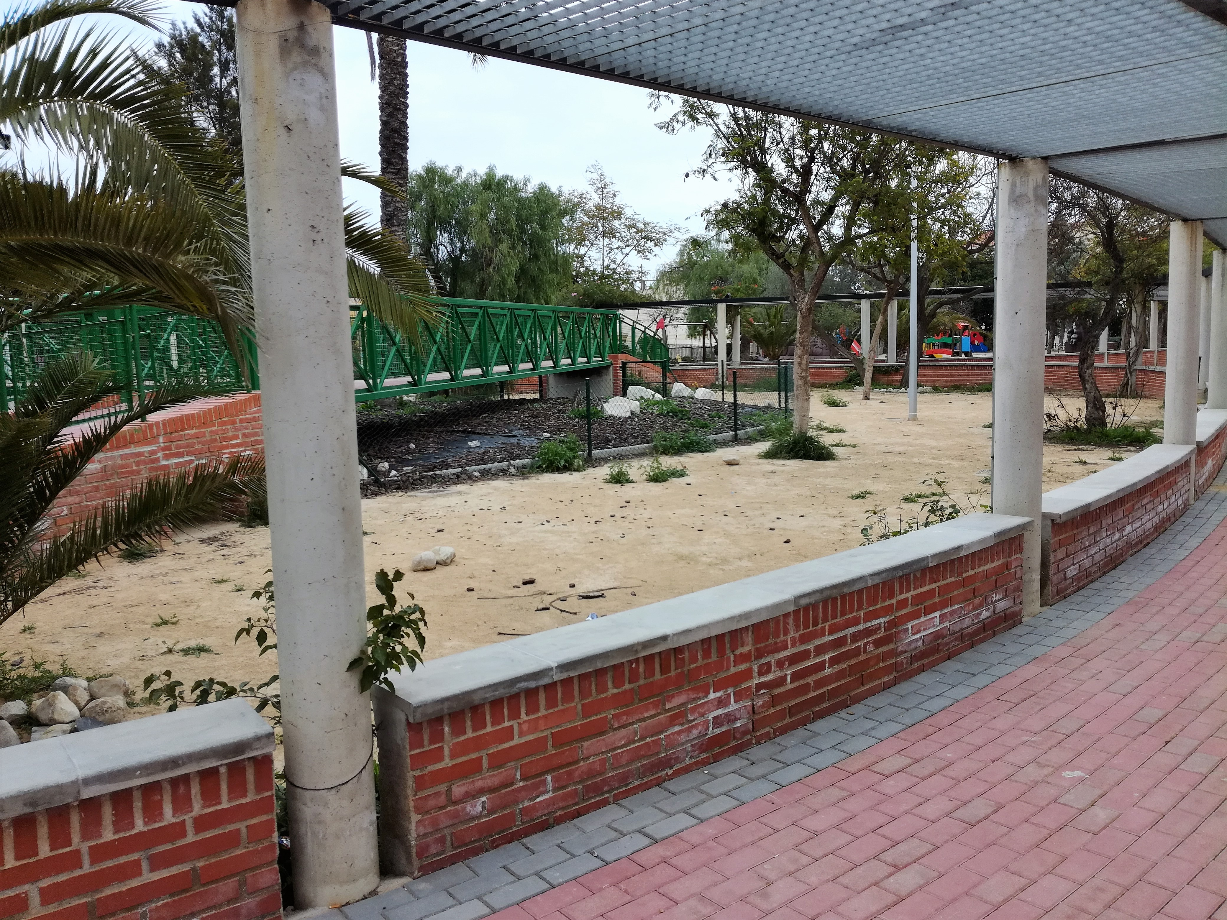 Foto de las pasarelas